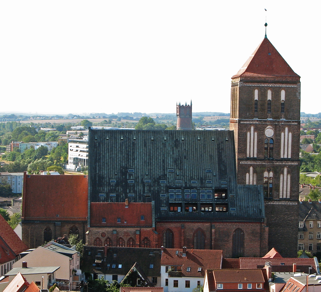 Beschreibung: Nikolai Kirche (Sicht von St. Petri) in Rostock, Germany Fotograf: Darkone, 31. August 2005